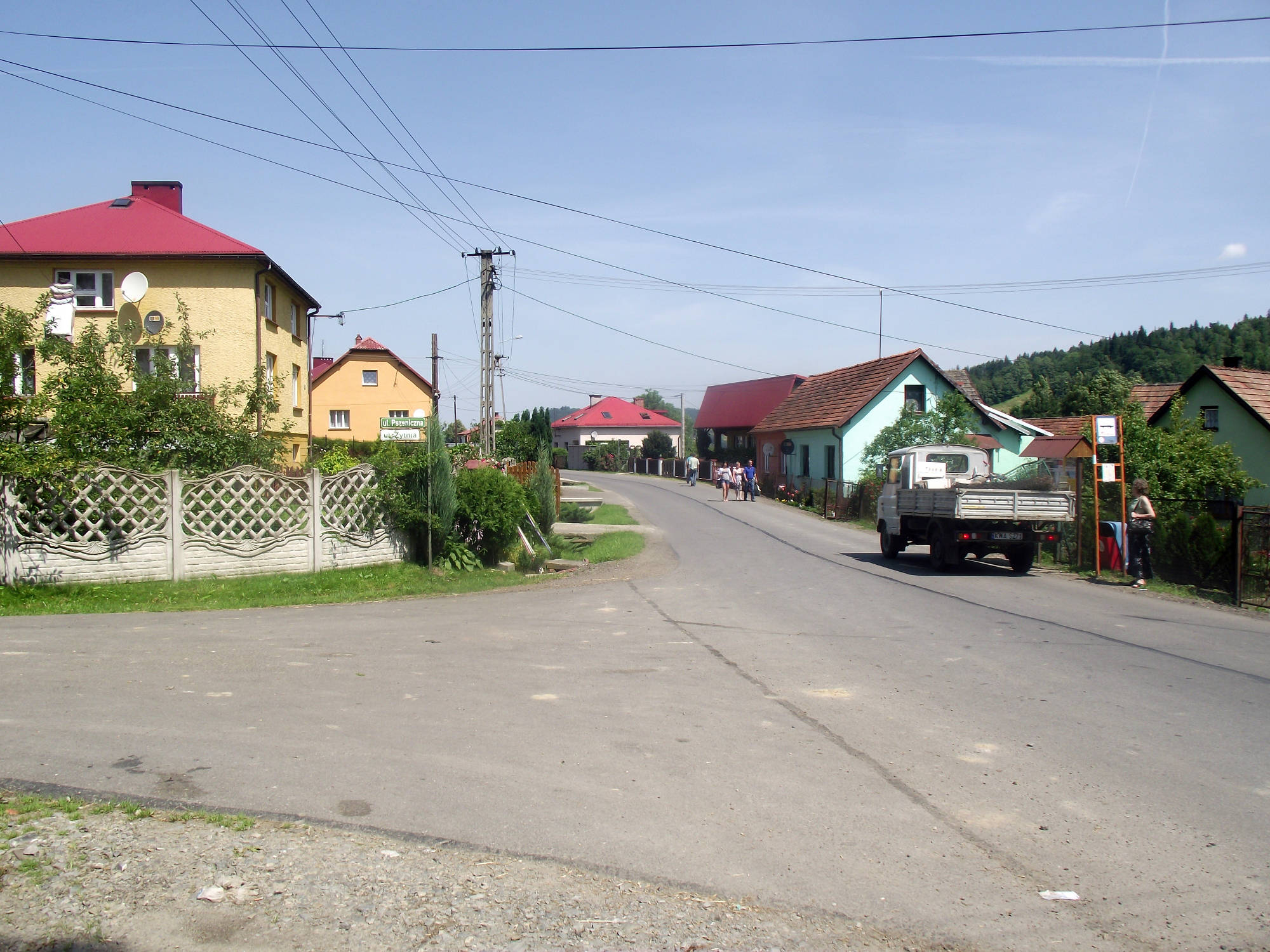 Droga w centrum Przyłękowa (powiat żywiecki).